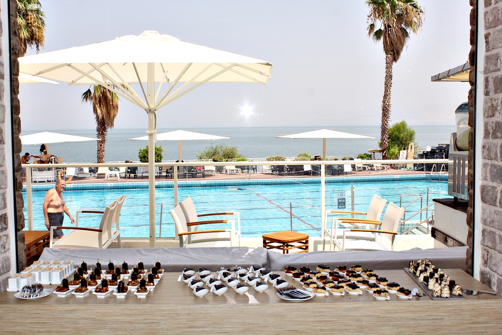 מעיינות חמי טבריה - מבט מהמסעדה